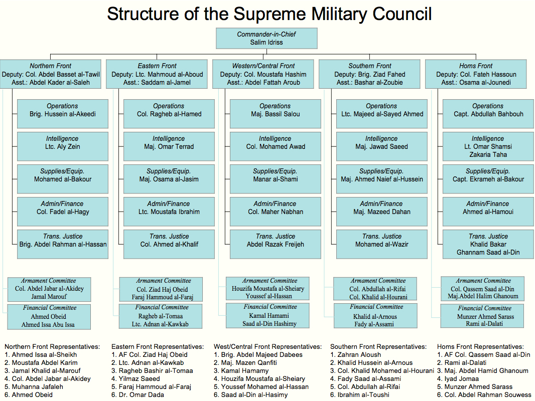 Структура Высшего военного совета ССА